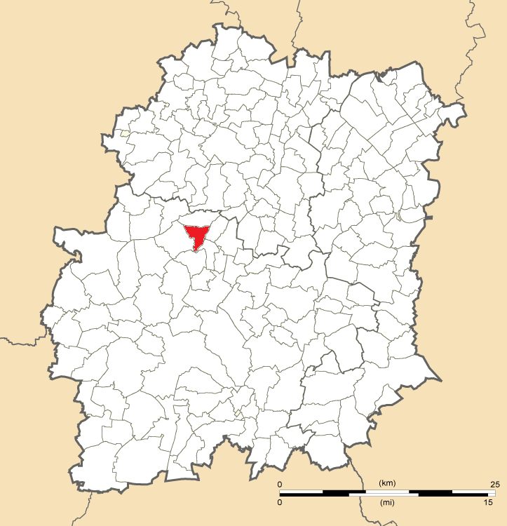 Carte de position de Breux-Jouy en Essonne (91)